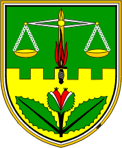 Wappen von Žetale (Schiltern), Slowenien